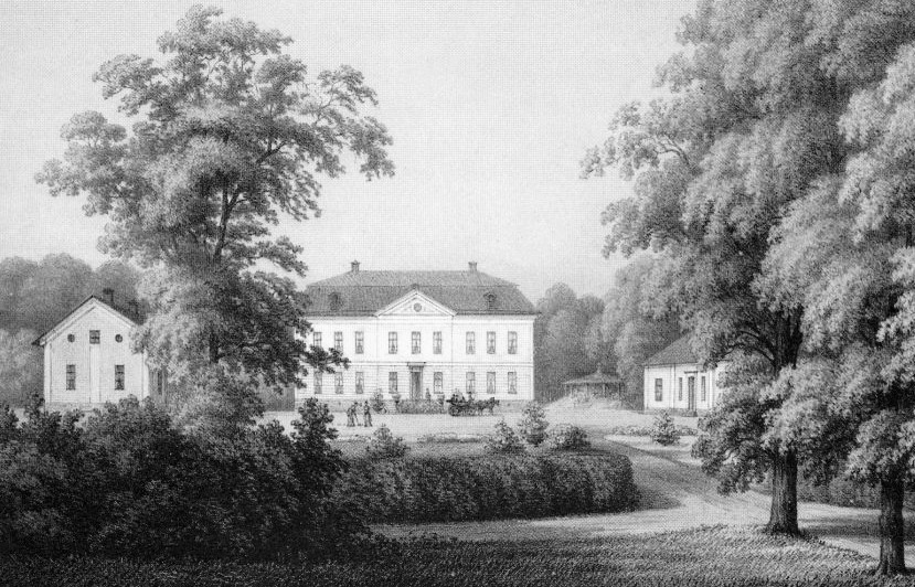 Strömsta på 1870-talet. Bilden tillhör Rolf Klingberg.